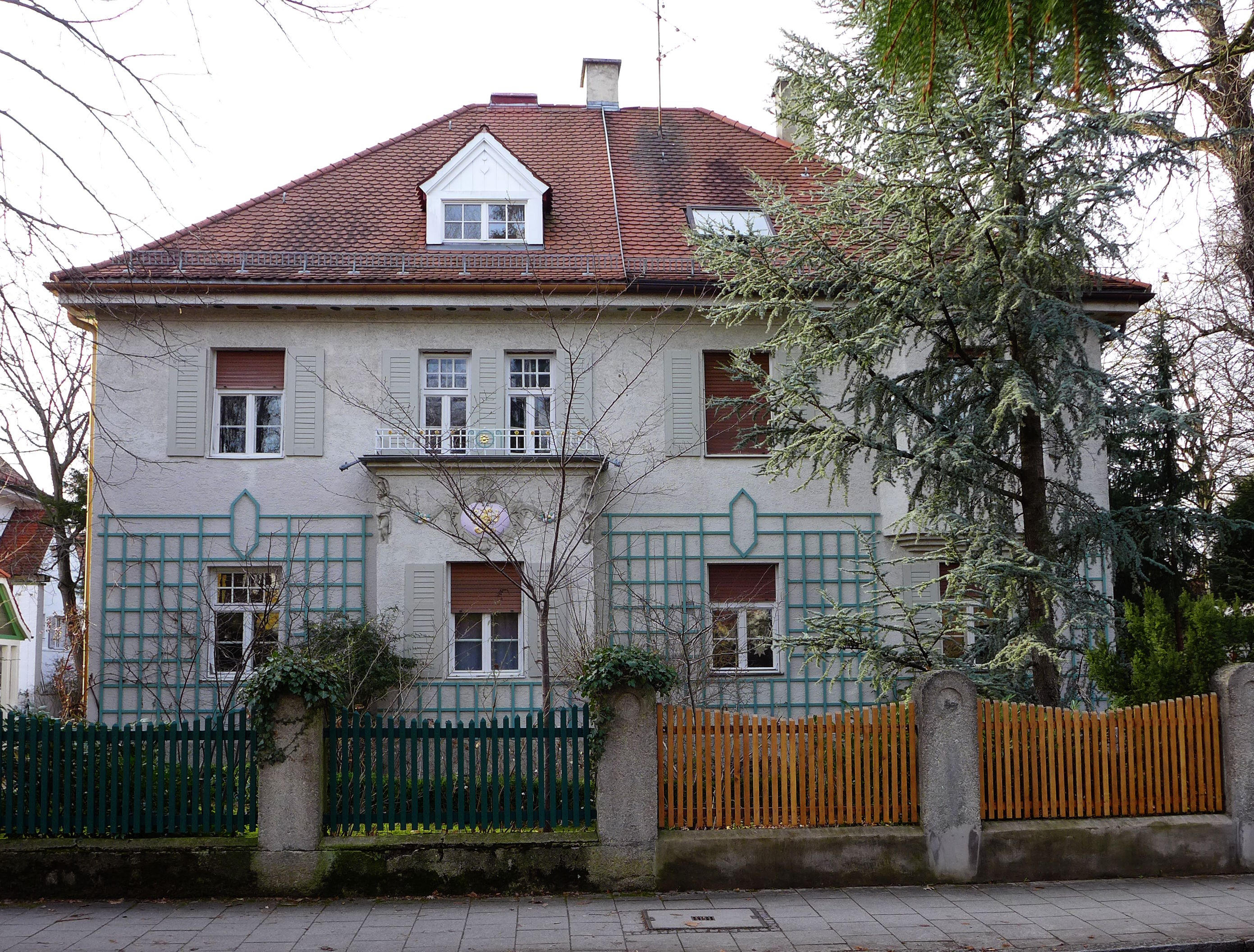 Floßmannstr. 9/11, München